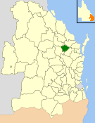 Comté de Biggenden Queensland, Australie